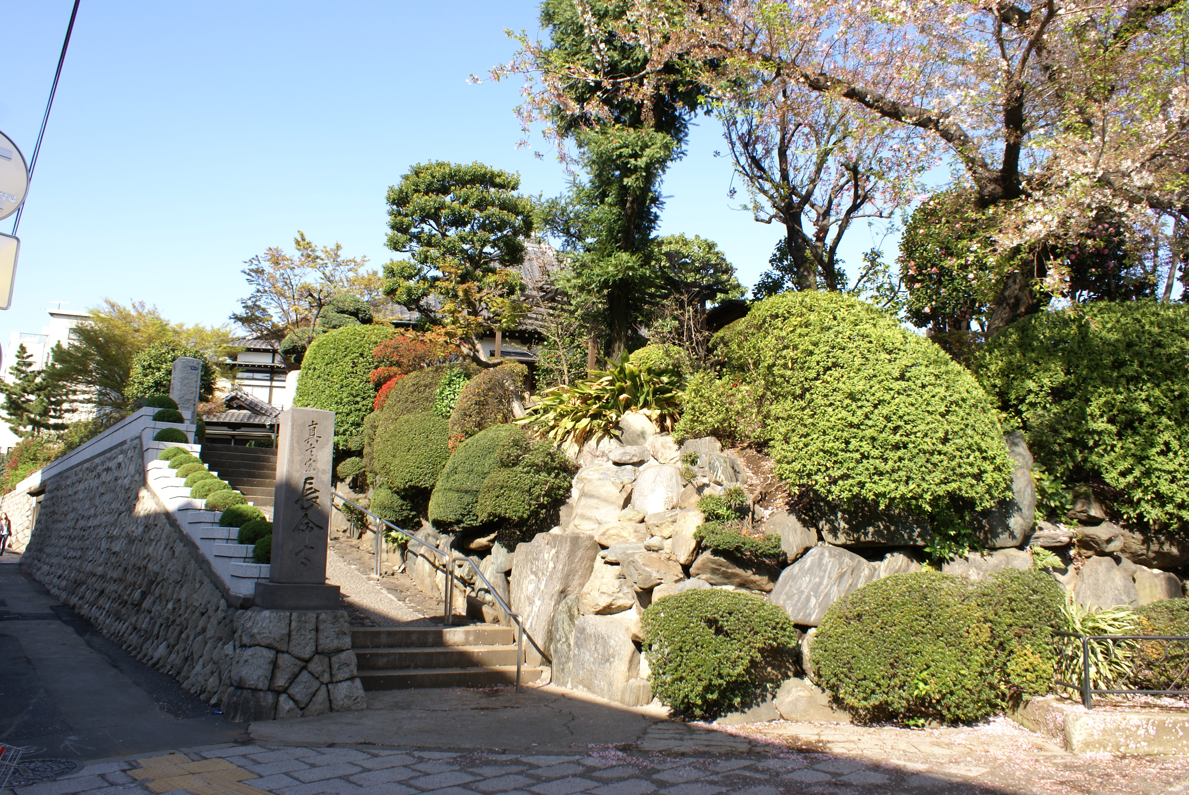 東山町長命寺